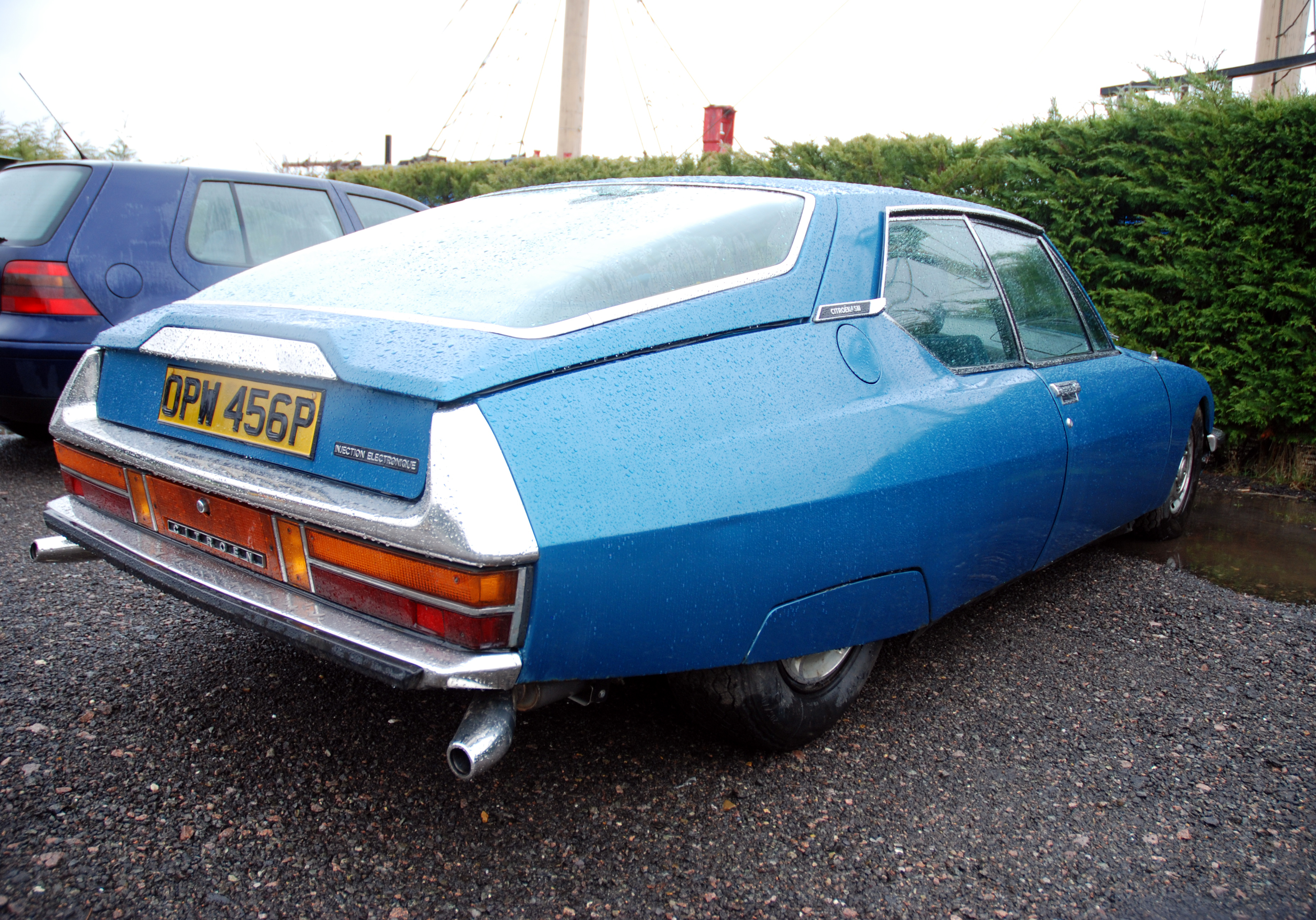 Transport Museum,Lower Stondon,Feb 2010